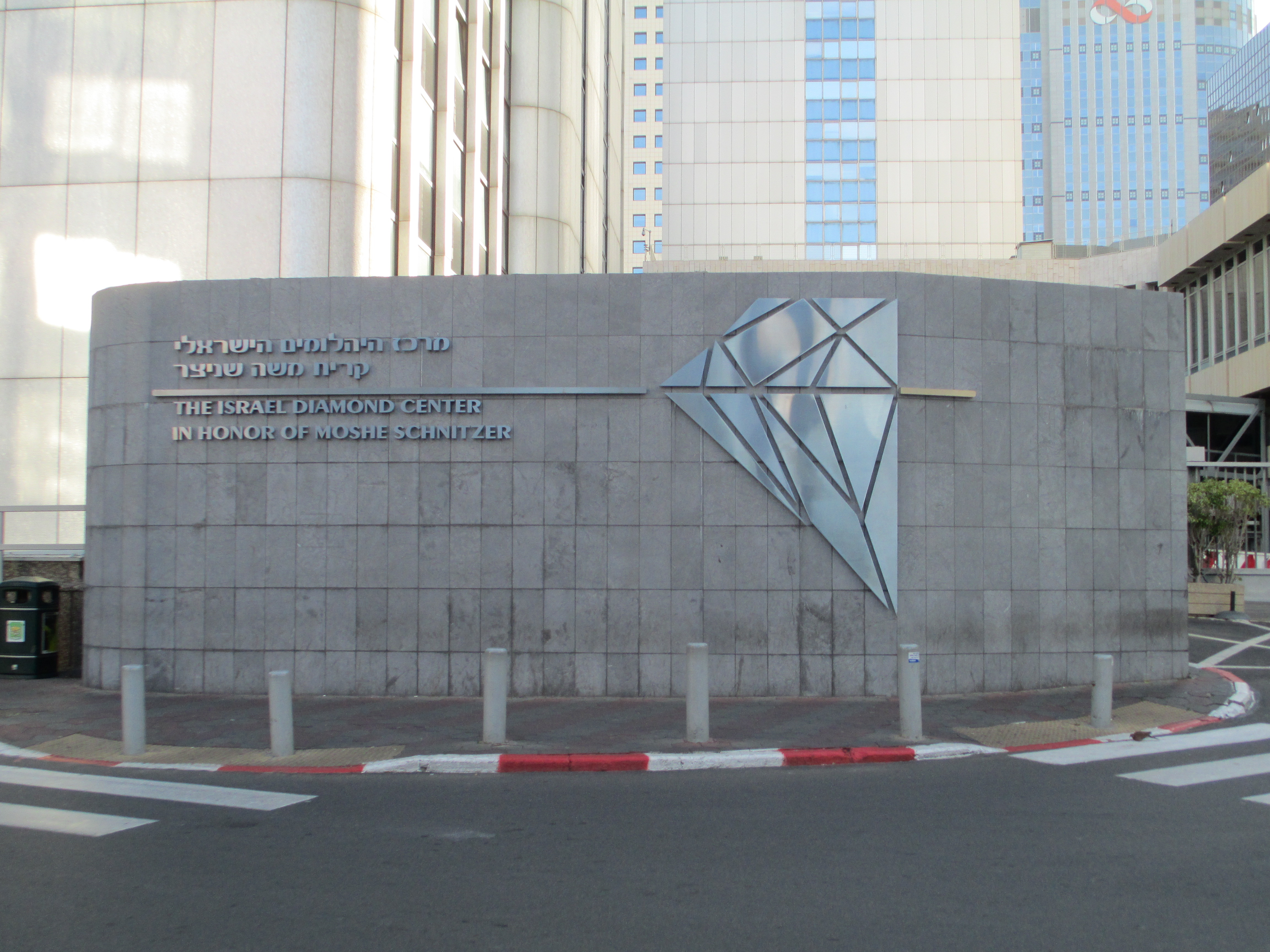 קריית משה שניצר-בורסת היהלומים